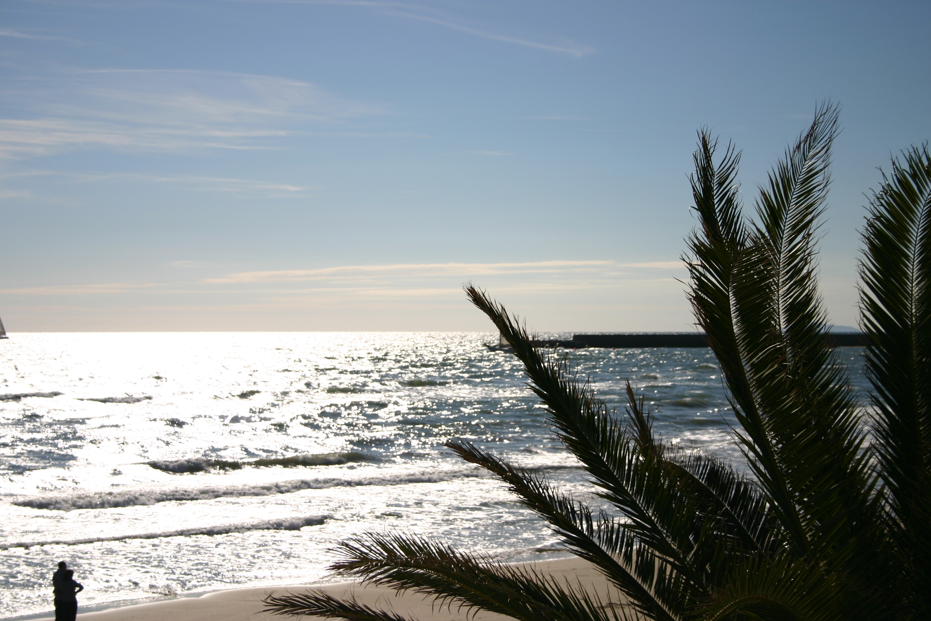 san felice circeo carrubo